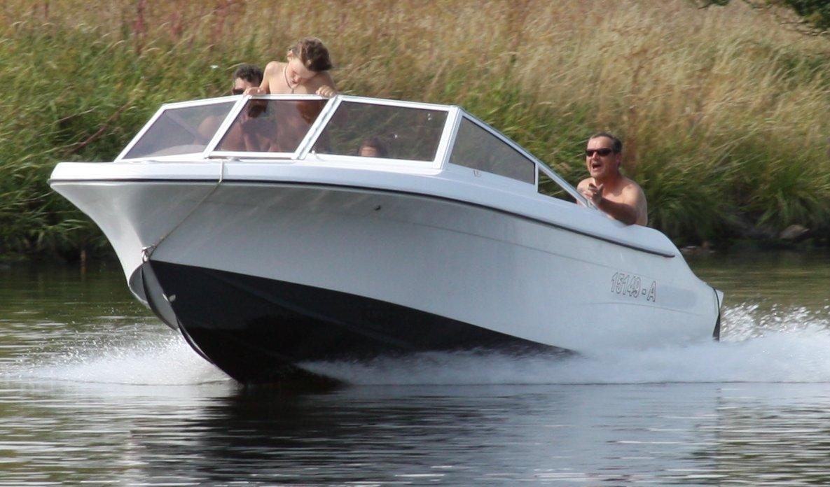 Halbgleiter; auf der Weser